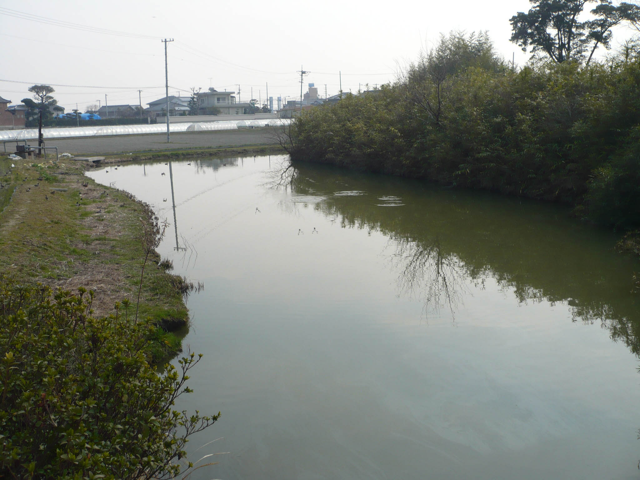 堀跡